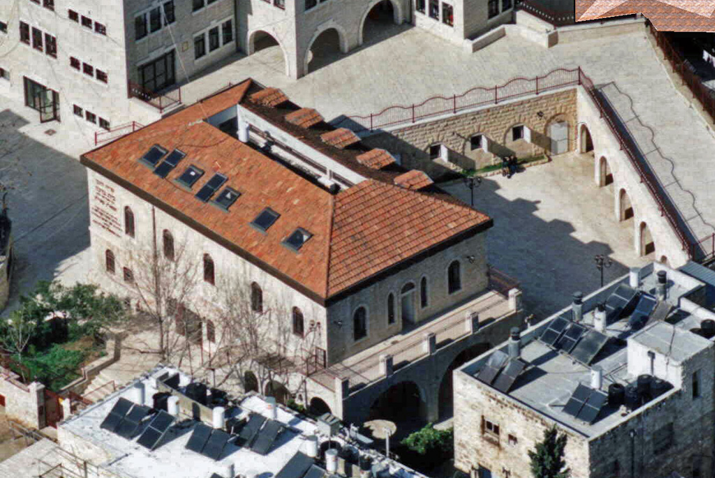 בית פין בכרם אברהם